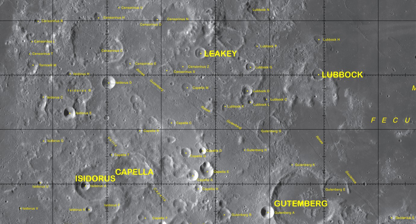 Cráter lunar Leakey. Localización. (Imagen LRO)